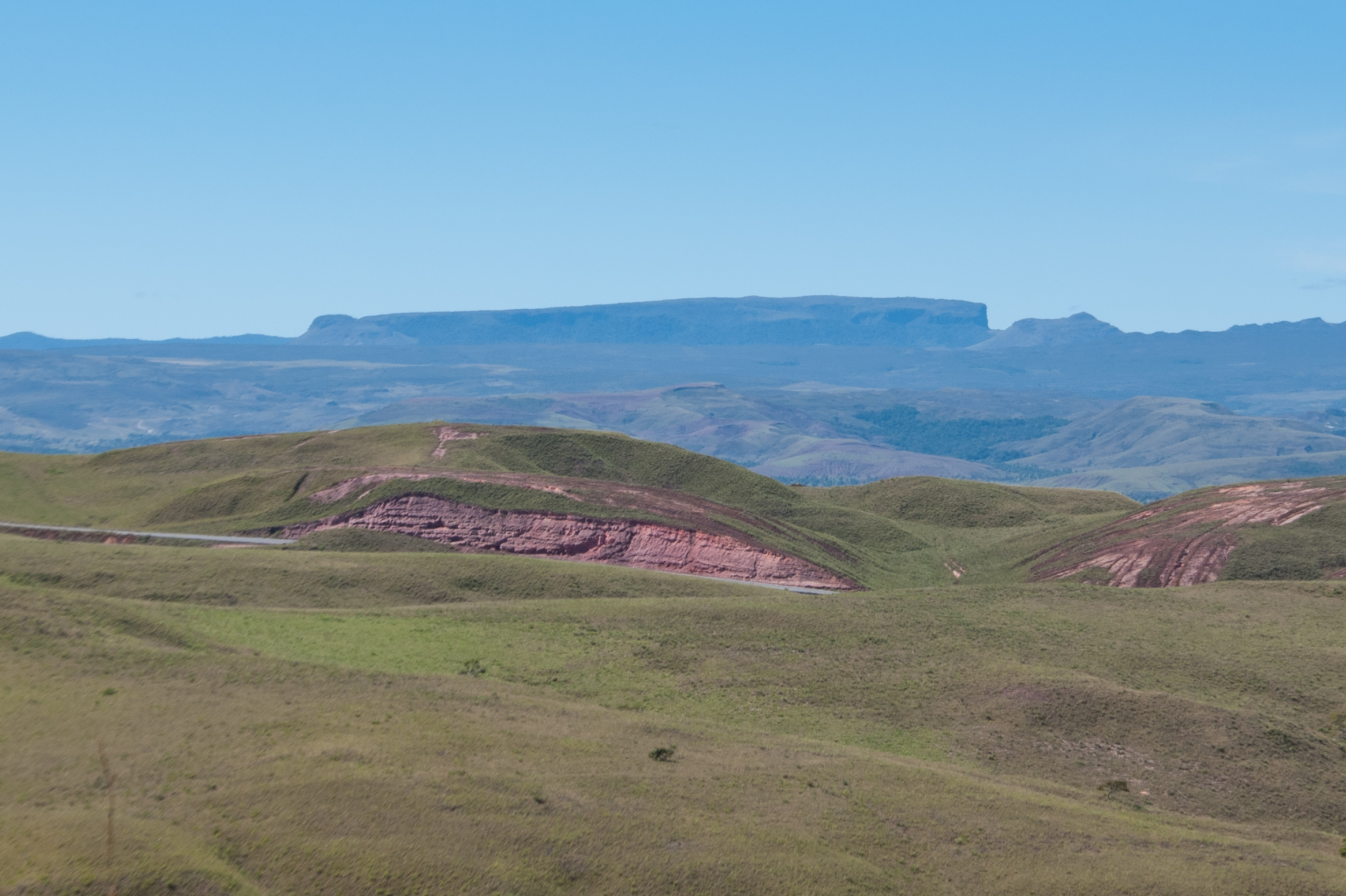 Chiricayén tepui en la Gran Sabana Venezuela.